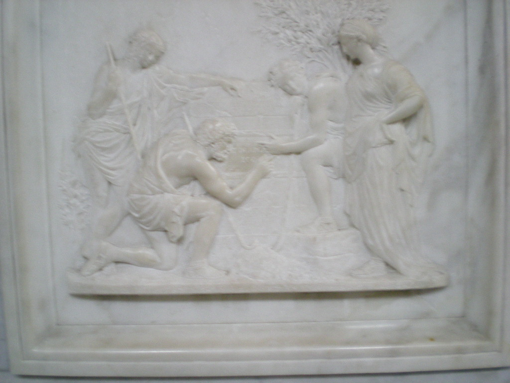 Dettaglio della tomba di Nicolas Poussin.